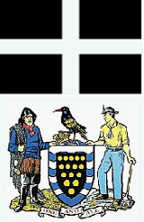 Cornwall Flag und Wappen (Hulu 2006)